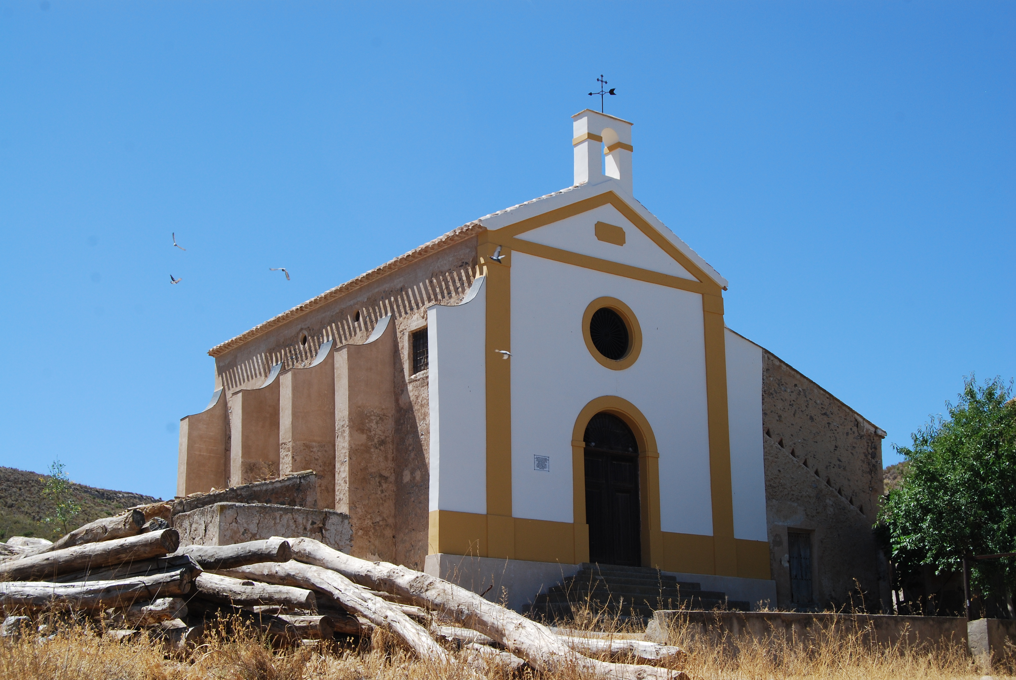 Vèneto: Vista de la fachada de la ermita